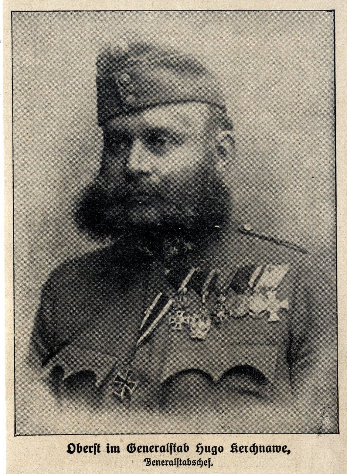 Oberst im Generalstab Hugo Kerchnawe, 1917